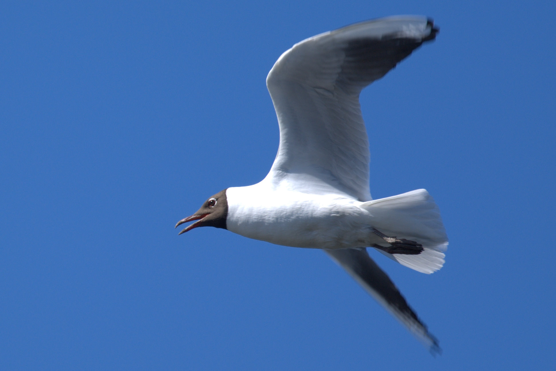 Lentävä naurulokki Luopioinen Haltianselällä.